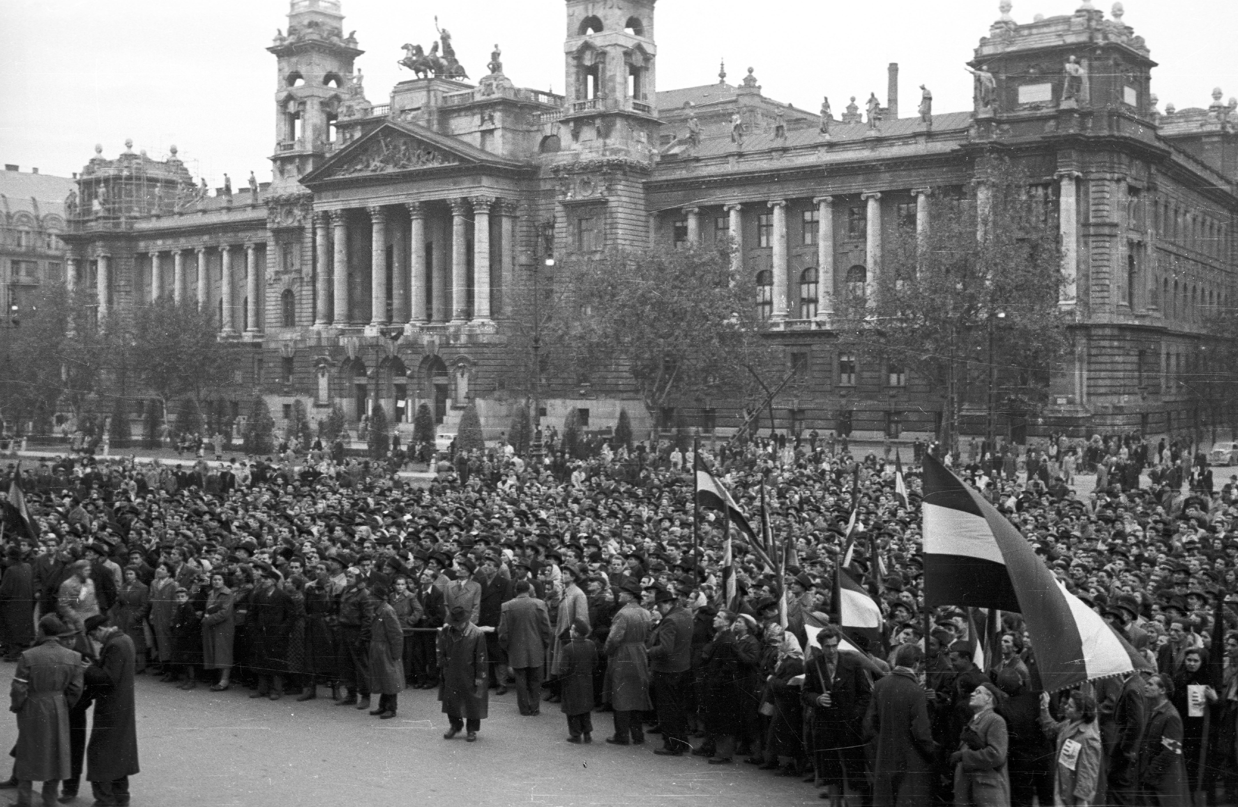 Kossuth Lajos tér, a Munkásmozgalmi Intézet (egykor Kúria, ma Néprajzi Múzeum) épülete. Location: Hungary, Budapest V. Tags: march, strike, flag, Budapest, revolution Title: Kossuth Lajos tér, a Munkásmozgalmi Intézet (egykor Kúria, ma Néprajzi Múzeum) épülete.